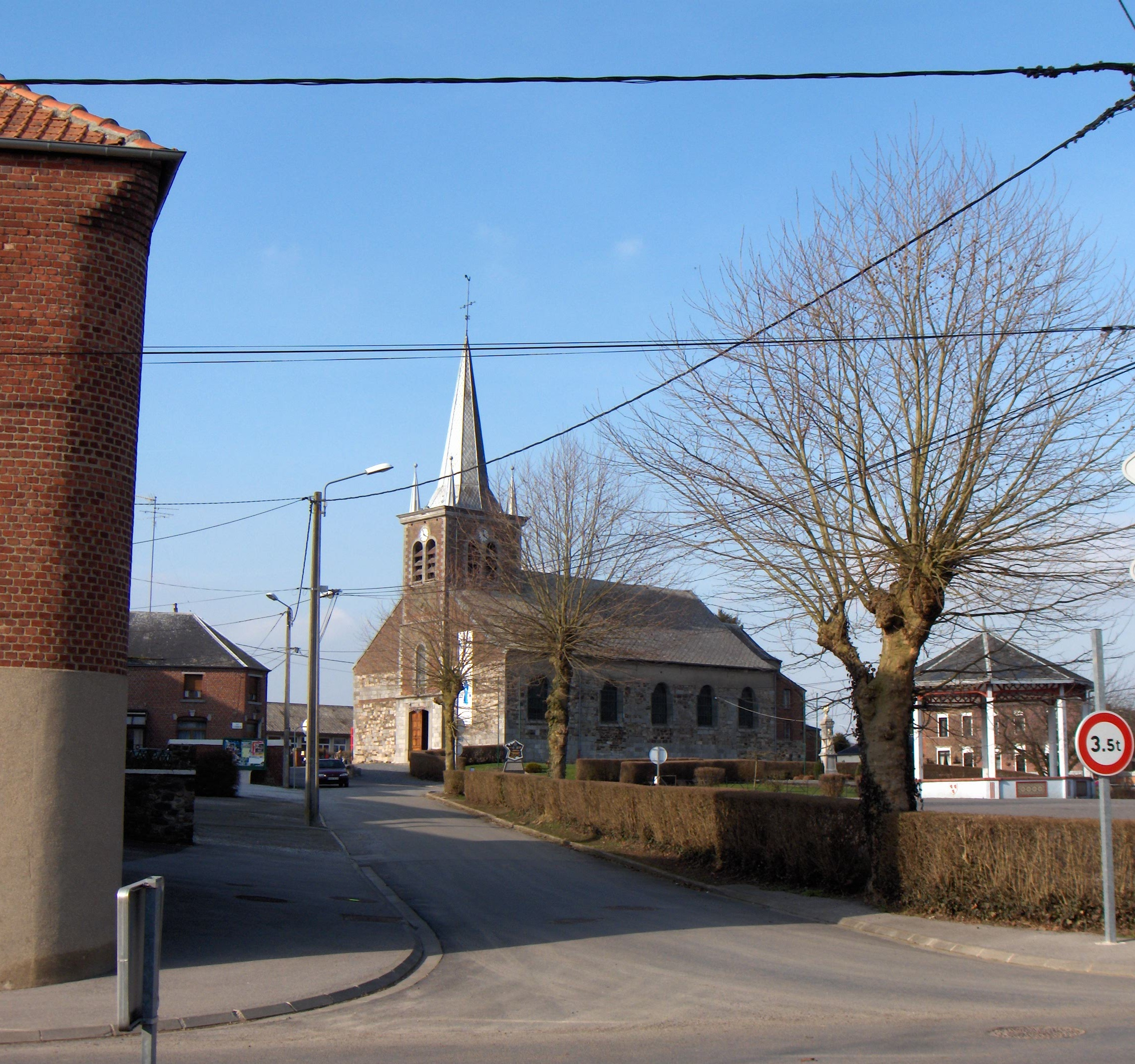 Villers-Sire-Nicole, Departement Nord, Frankreich: Dorfmitte mit Martinikirche (älteste Teile aus dem 15. Jh., Turm aus dem 19. Jh.).